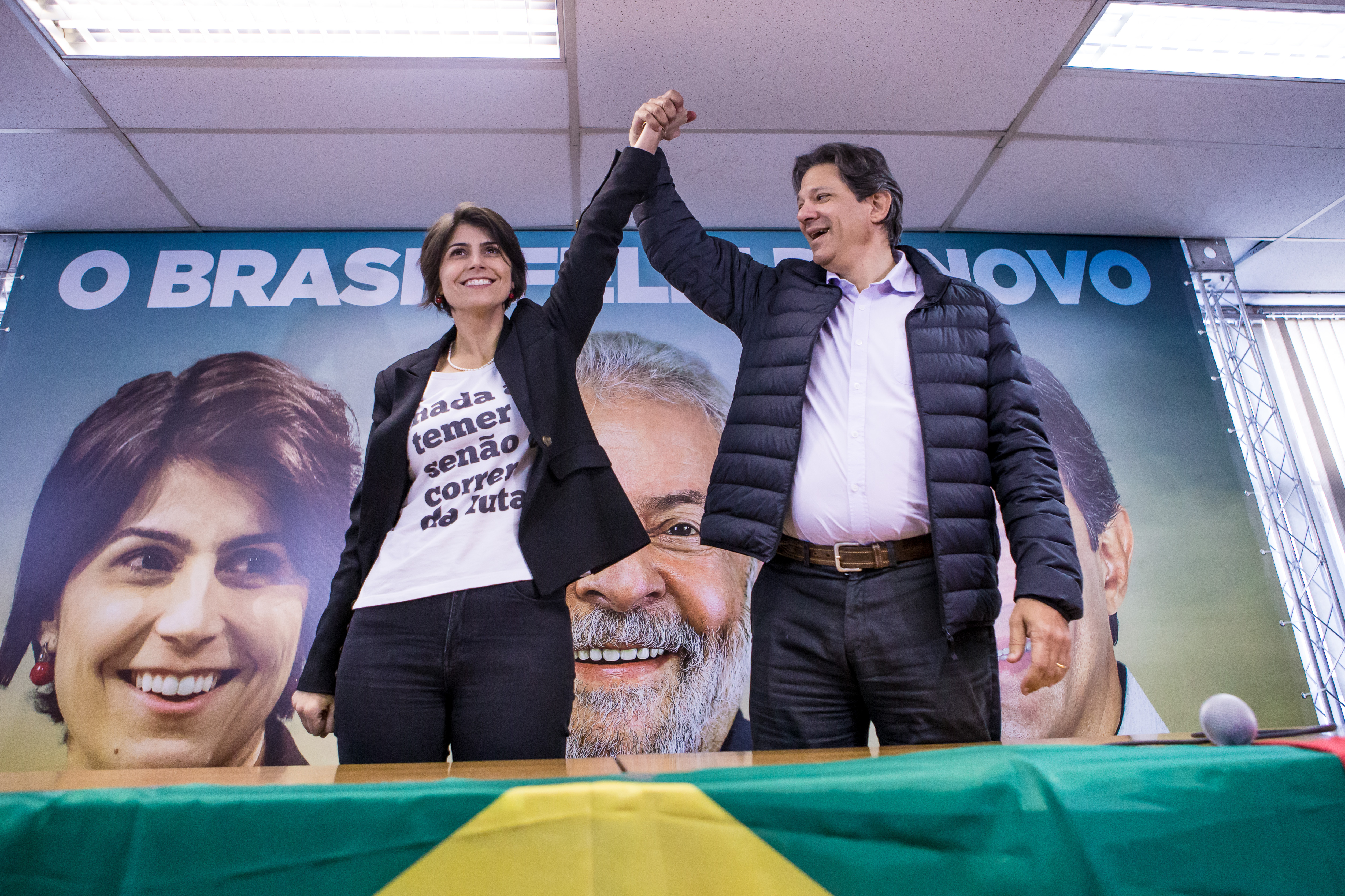 Coletiva de imprensa - Manuela D`Avila e Fernando Haddad São Paulo, 07/08/2018